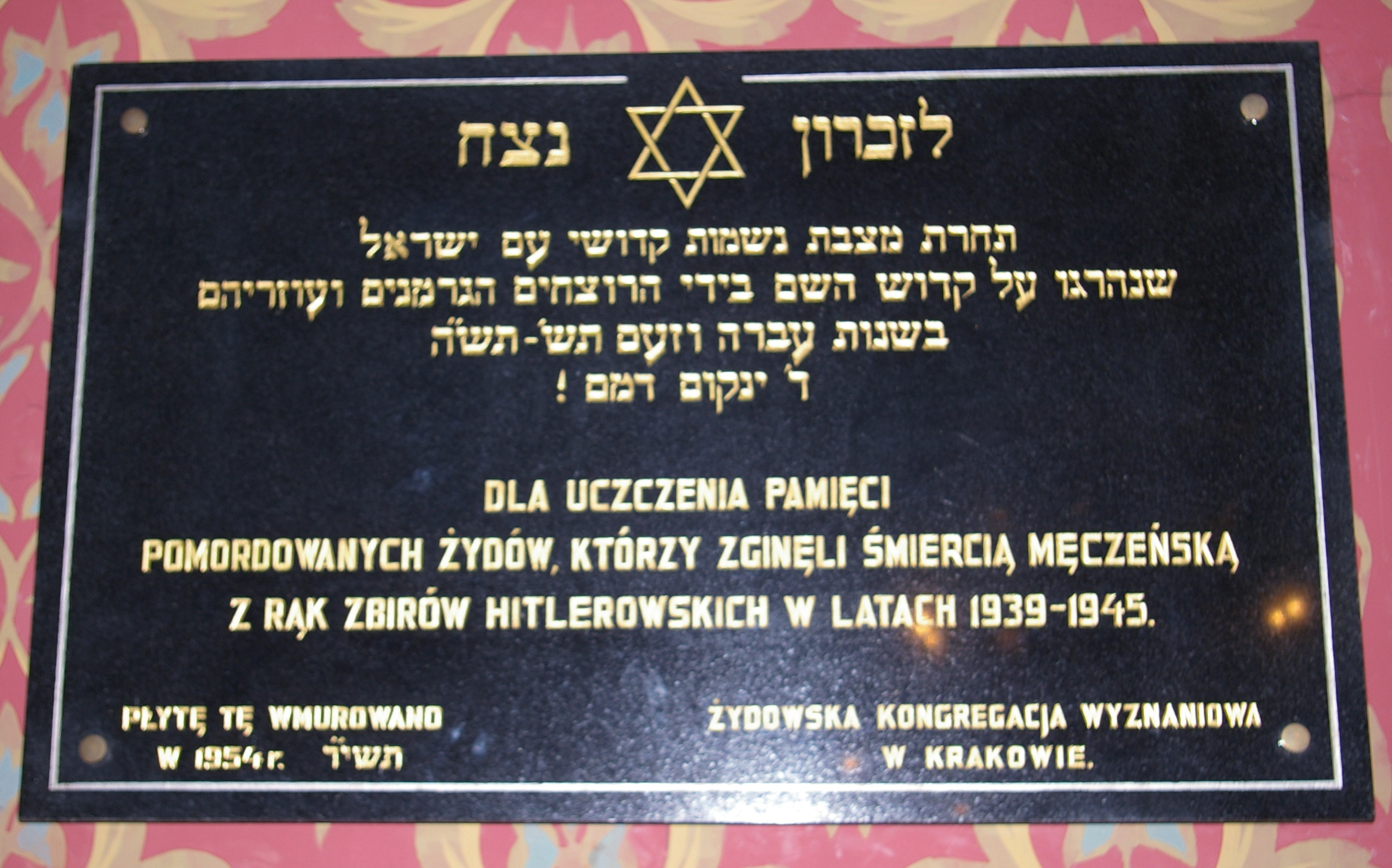 Tablica pamiętkowa w Synagodze Tempel w Krakowie